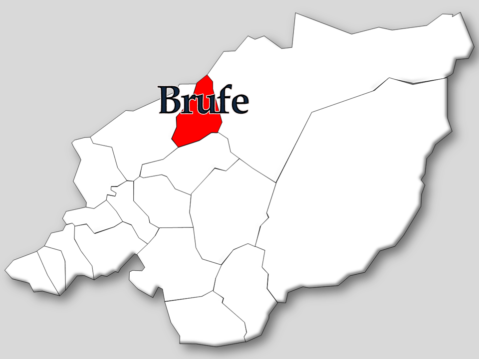 Censos 1864/2011